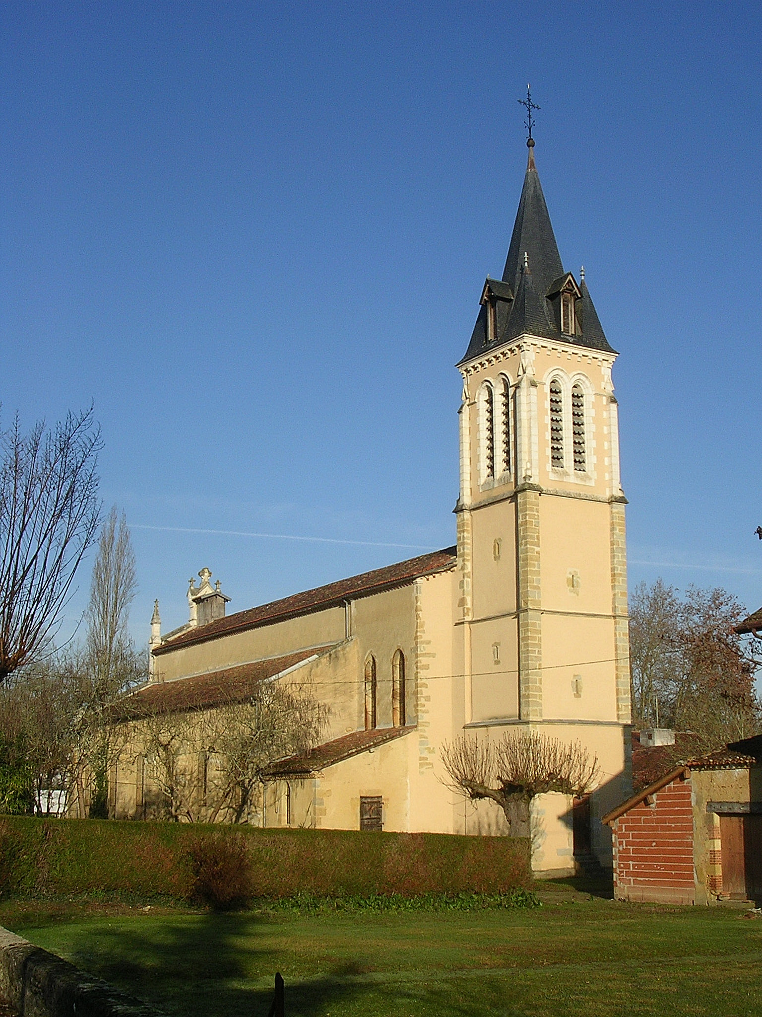 Église Sainte-Eugénie d'Eugénie-les-Bains (Landes, France)